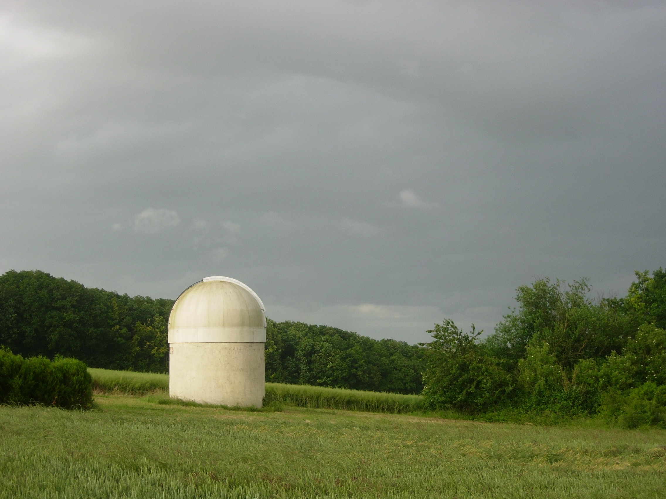 Observatoire de Macey (Aube)